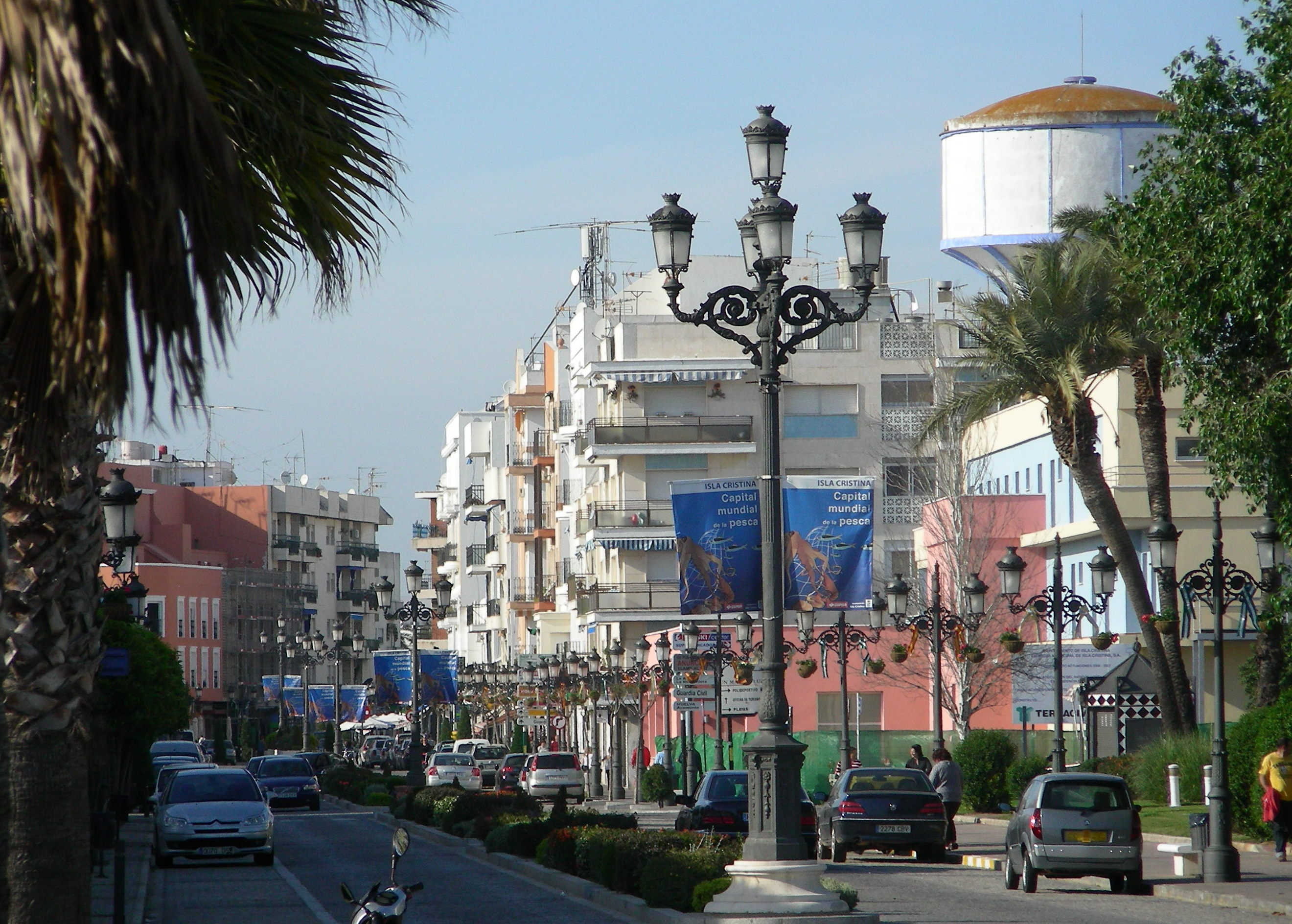 Gran Vía de Román Pérez Romeu durante el Cluster de Empresas en Terceros Países, con el eslógan "Isla Cristina, capital mundial de la pesca".